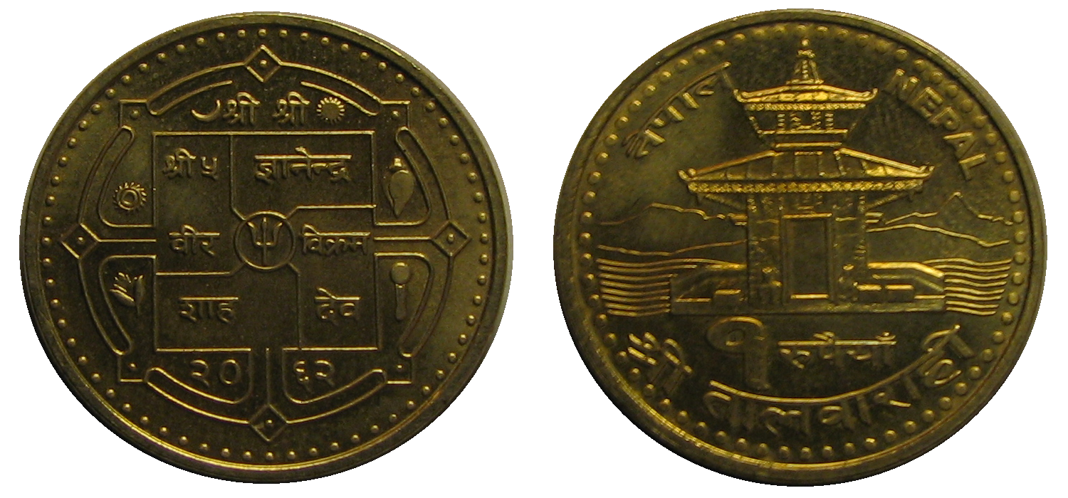 Nepalese One-Rupee-coin